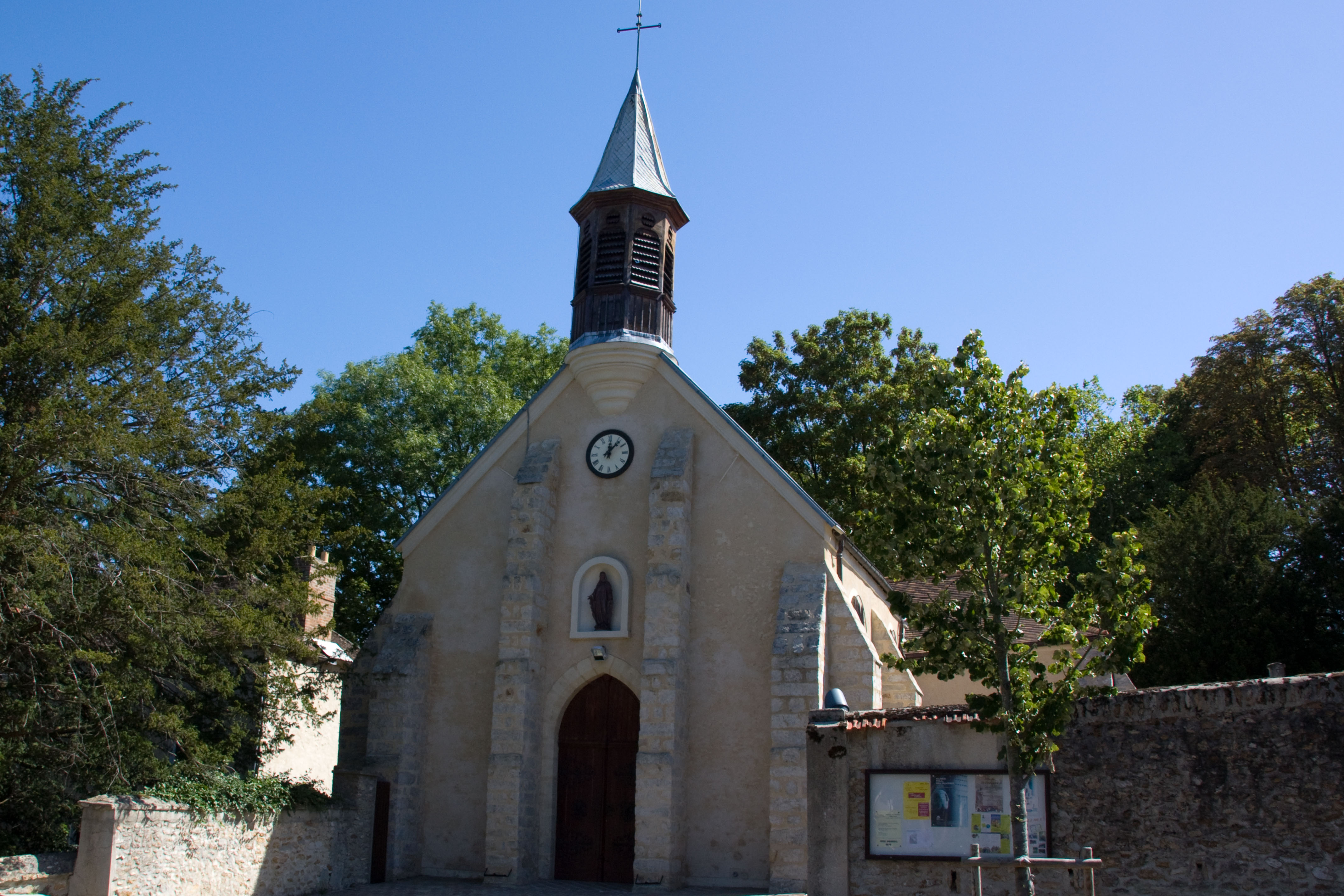 Eglise du Coudray-Montceaux, Le Coudray-Montceaux, Essonne, France